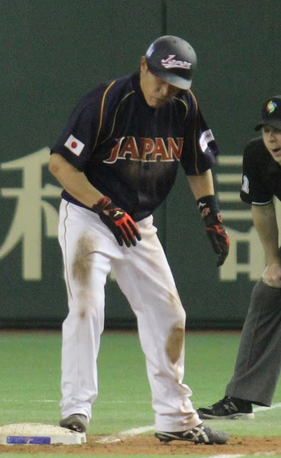 Hirokazu Ibata